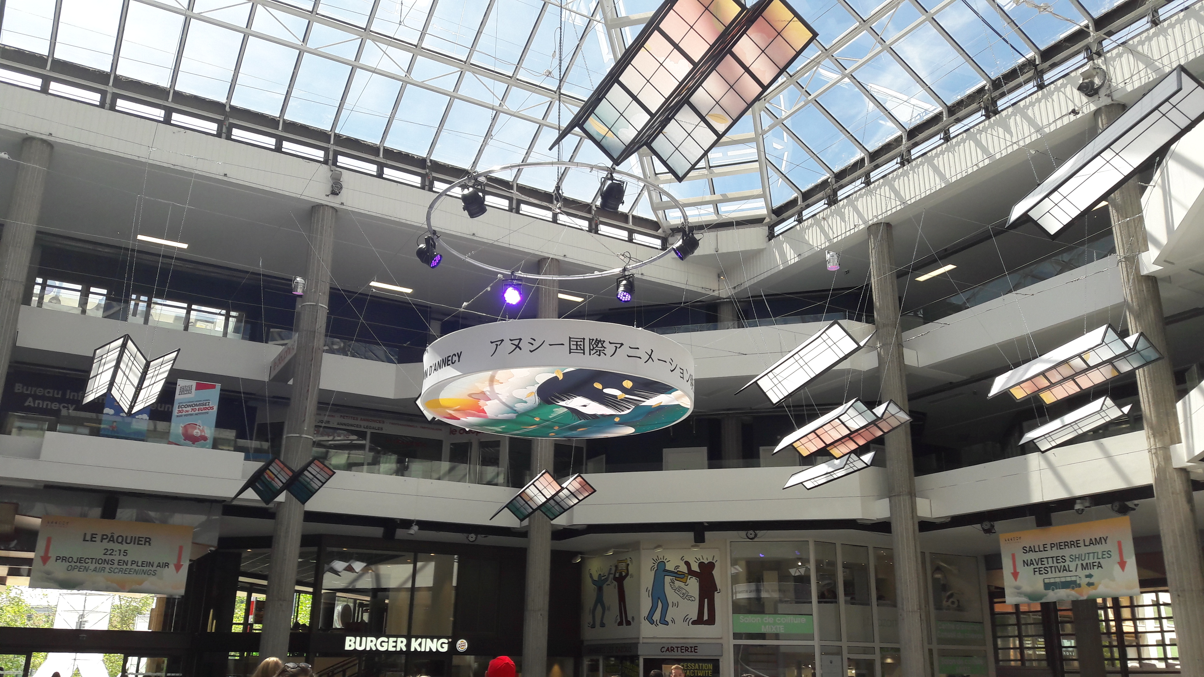 Le centre culturel Bonlieu à l'occasion du festival international d'animation d'Annecy 2019